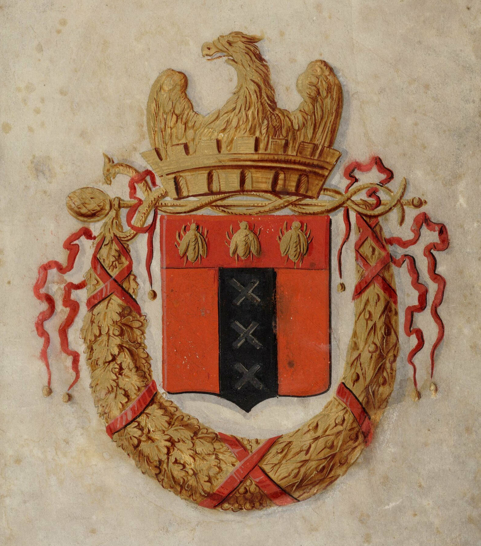 Het schildhoofd met drie gouden bijen was onderdeel van het door Napoleon ingevoerde nieuwe keizerlijke heraldisch systeem. De versiering was, samen met de uitwendige ornamenten als een muurkroon met adelaar en festoenen van eikenblad en olijvenbladeren voorbehouden aan de “bonnes villes de l’Empire”, steden van de eerste orde. Napoleon benoemde Amsterdam tot de derde stad van het Franse keizerrijk, na Parijs en Rome. Tekening. Techniek: potlood, penseel in kleur, gehoogd met goud.